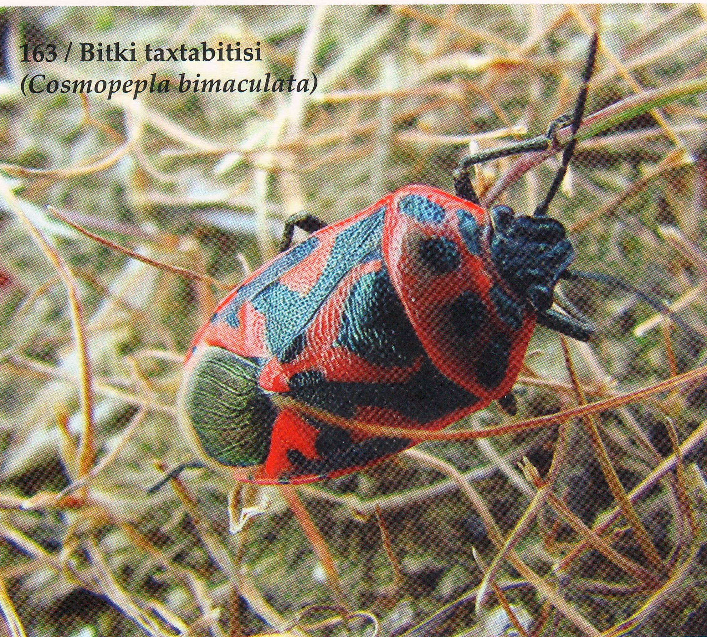 Saatlı bitki taxtabiti